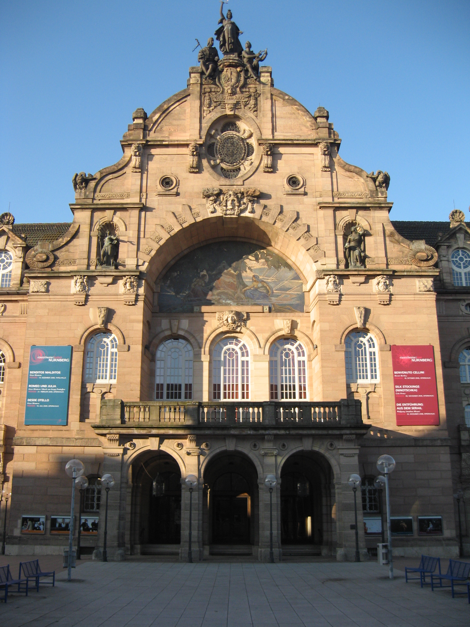 A nürnbergi Staatstheater bejárata